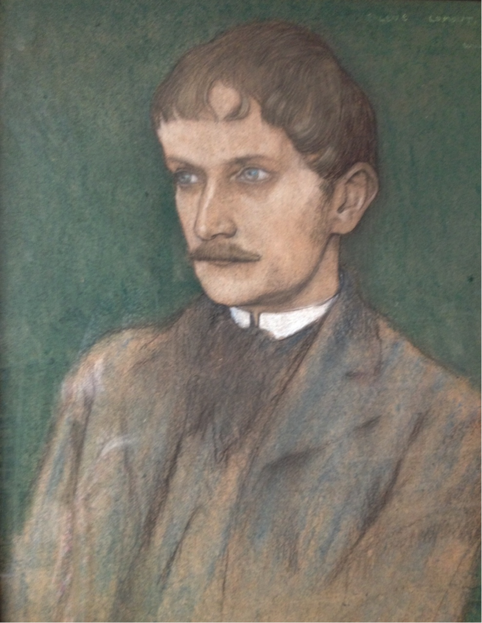 huile sur toile